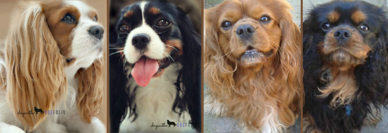 Κάβαλιερ Κινγκ Τσαρλς Σπάνιελ: Οι τέσσερις χρωματισμοί της φυλής